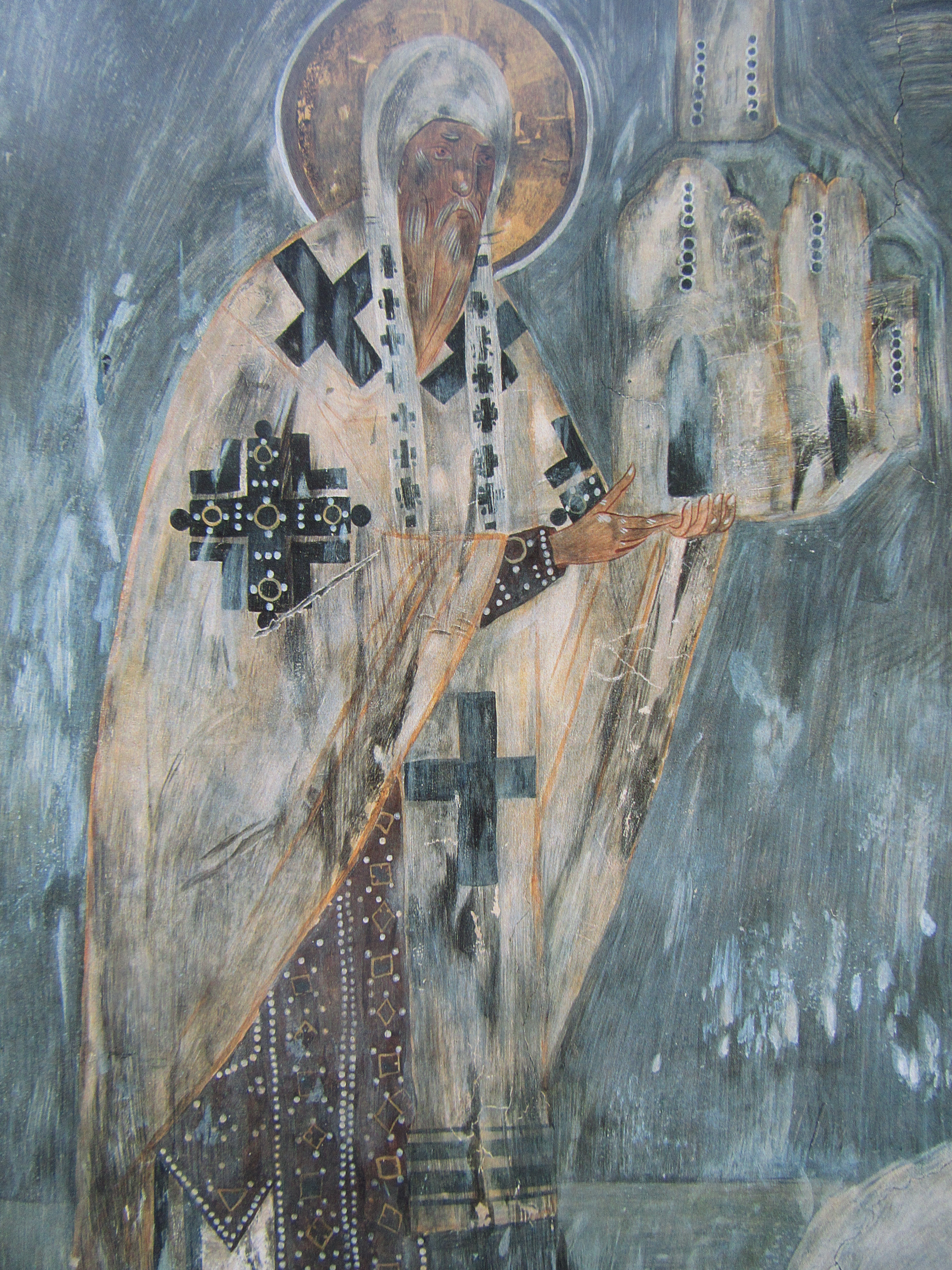 Fresque du mur sud copie au Musée russe de Saint Petersbourg de l'archevâque Moïse , ,fresque de Vololoto 1380